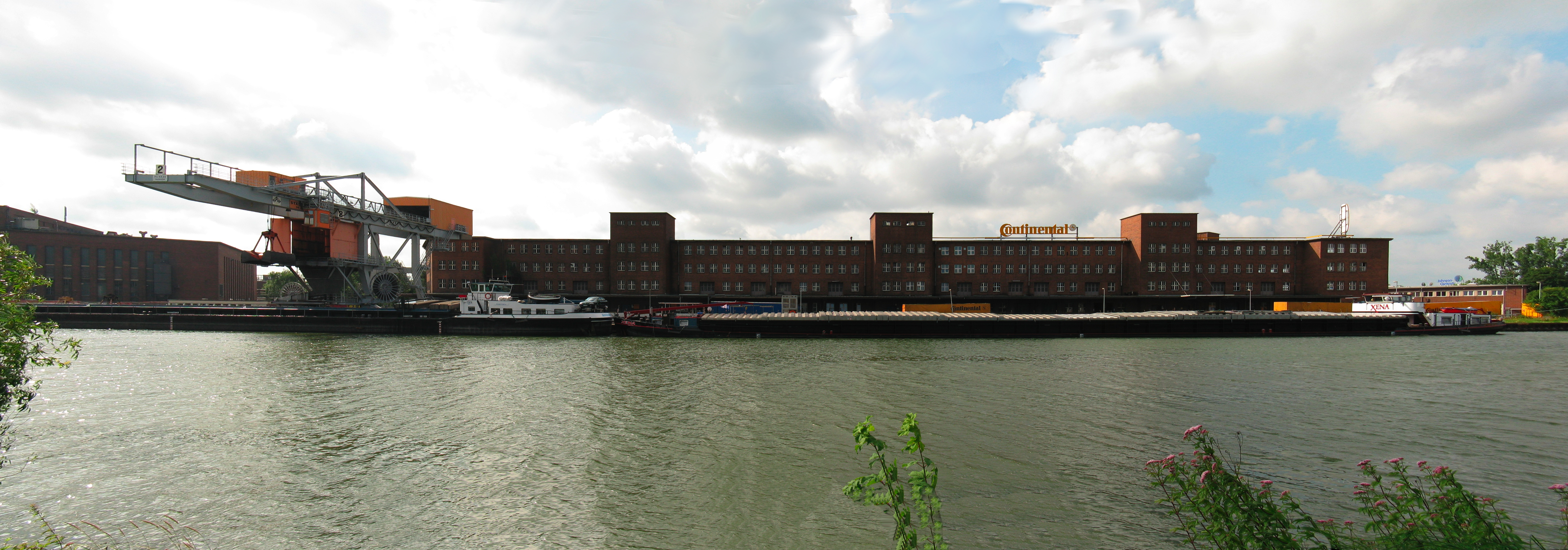 Panorama des Fabrikgebäudes der Continental AG in Hannover-Stöcken, aufgenommen von der anderen Mittellandkanalseite